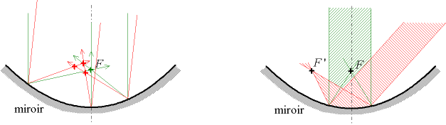 Focalisation de rayons parallèles par une miroir parabolique. La figure de gauche montre que la focalisation est imparfaite, les rayons non parallèles à l'axe ne se coupent pas tous au même point. La figure de droite montre de manière caricaturale la focalisation approché dans les hypothèses de Gauss. Auteur : Christophe Dang Ngoc Chan, réalisé avec un programme de dessin vectoriel Licence GFDL Christophe Dang Ngoc Chan